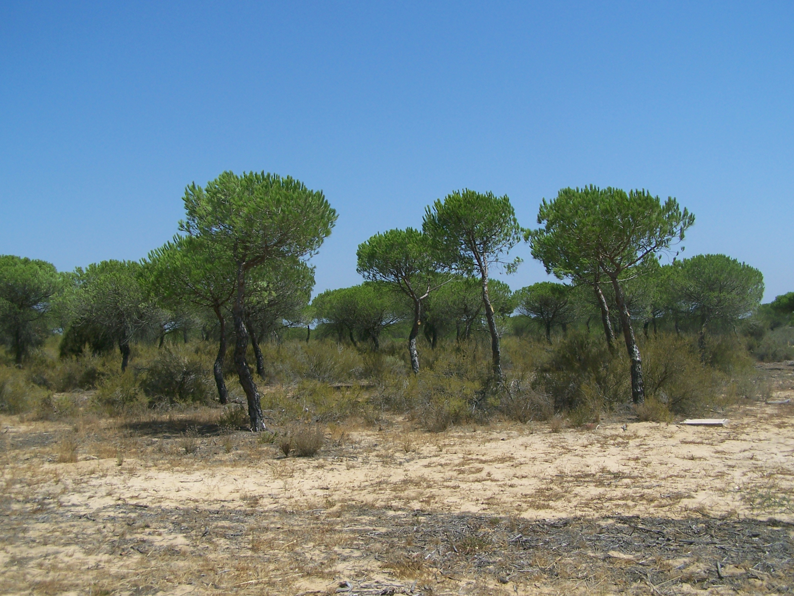 Pinus pinea, Parque Nacional de Doñana, Spain